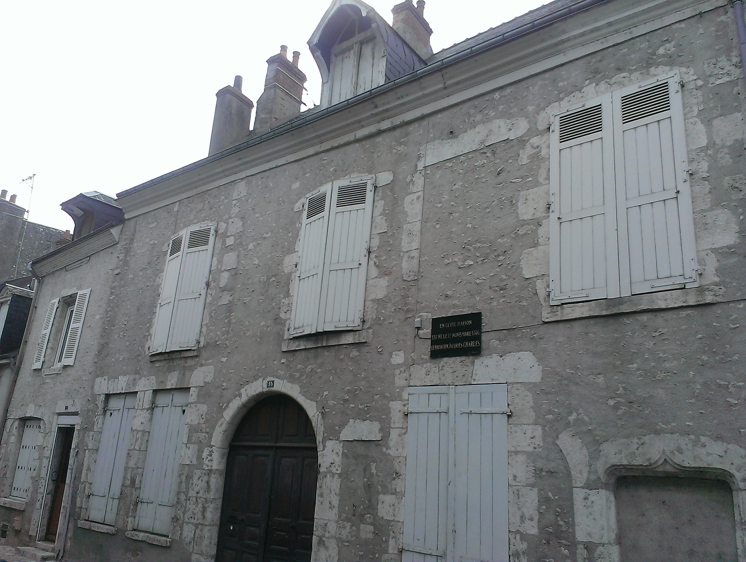 Maison natale du physicien Charles, à Beaugency (Loiret)